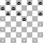 Игра Вертмана